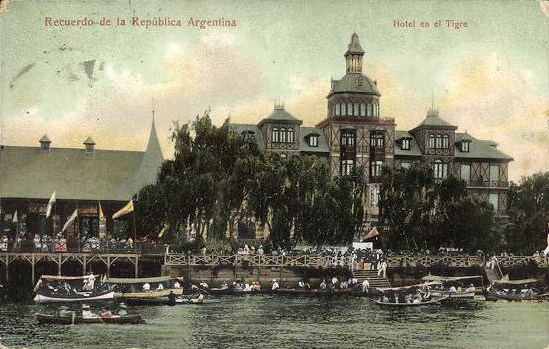 El Tigre Hotel, construido en Tigre, Buenos Aires, hacia 1890. Visto desde el Río Luján.